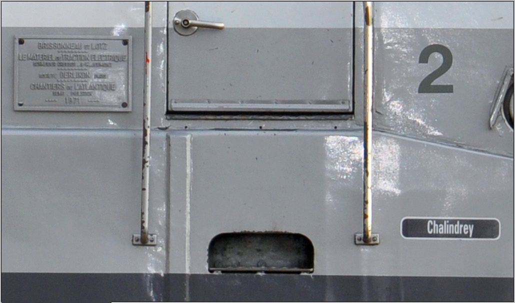 Vue à Luçon le 7 août 2015, la BB 67544 (série 67400) porte sa plaque de constructeurs, et la marque de son ancienne attache à Chalindrey (Haute-Marne)